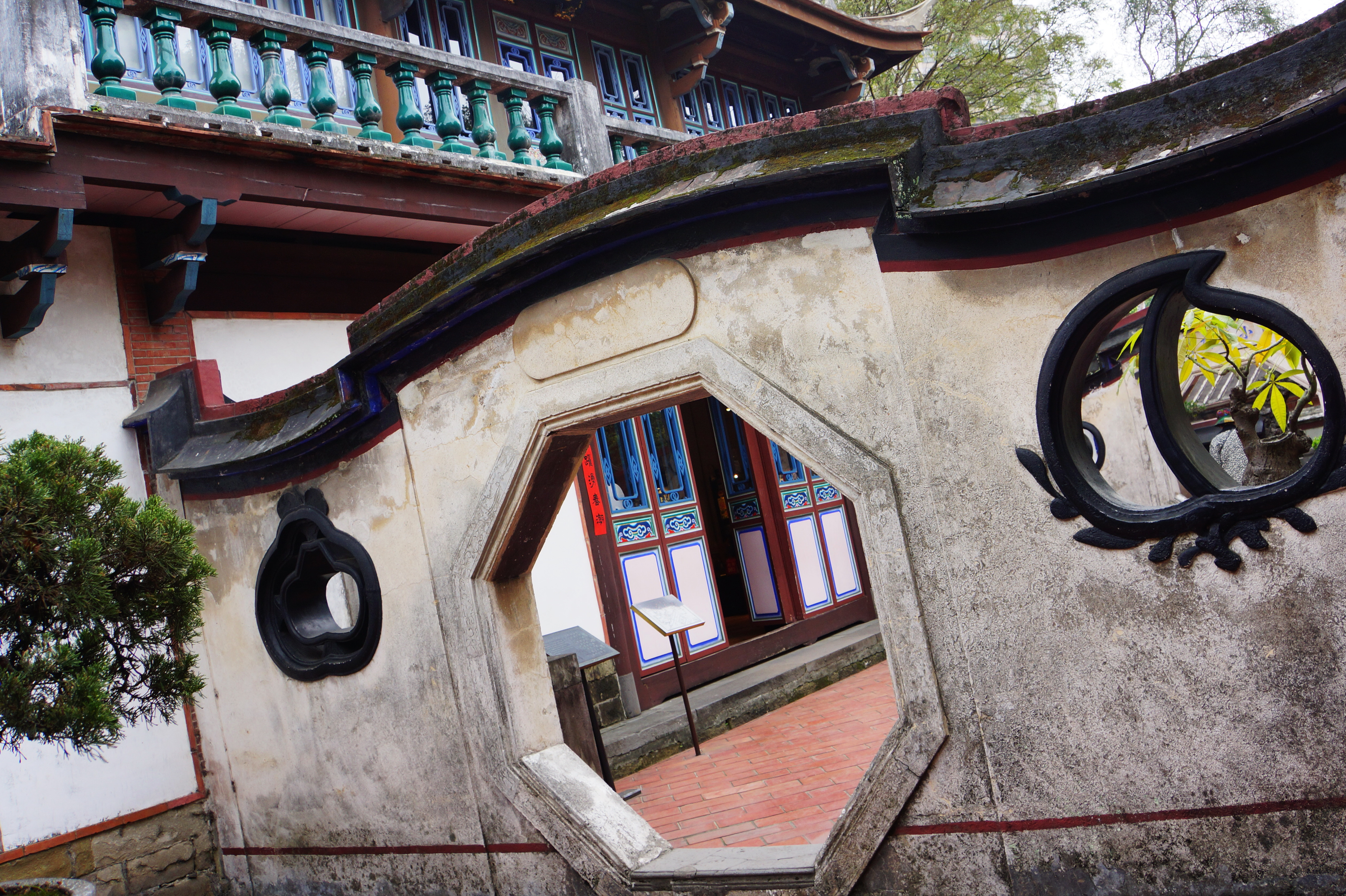 觀稼樓 Guan Jia Hall